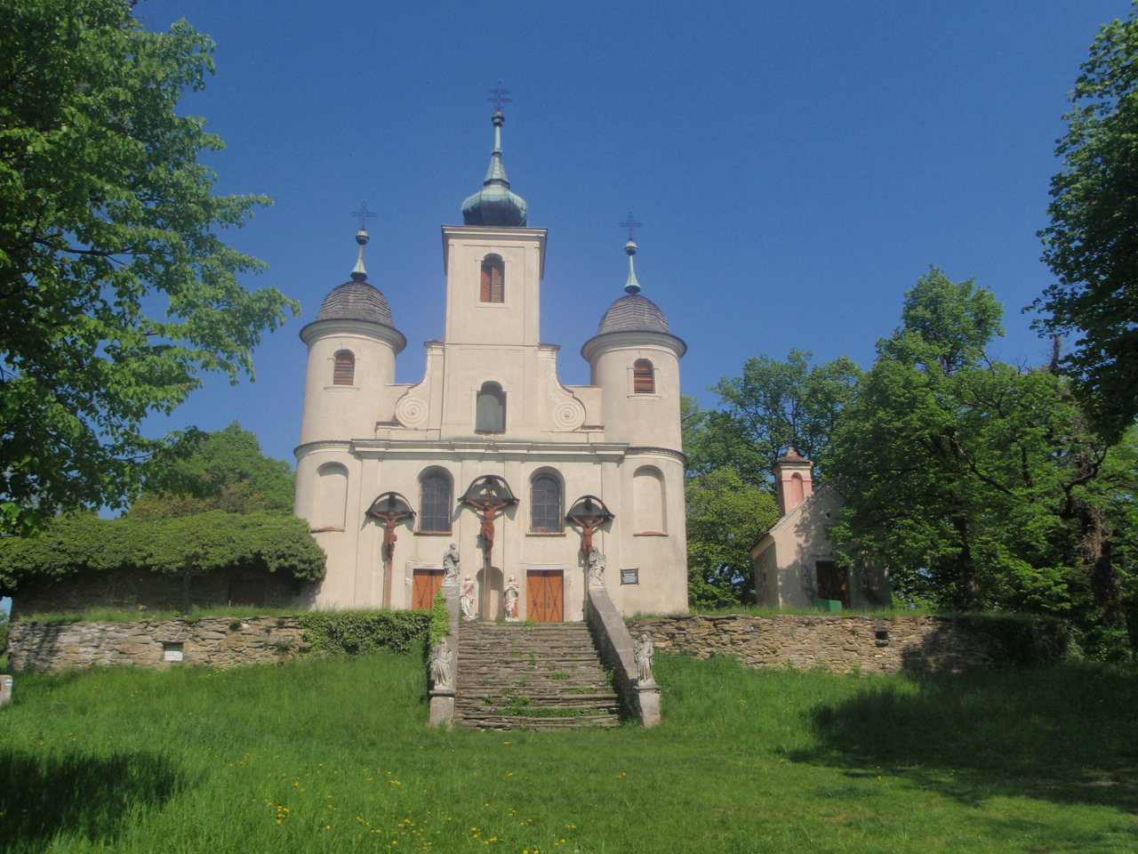 Kreuzesweg und Zönobithaus in Güns